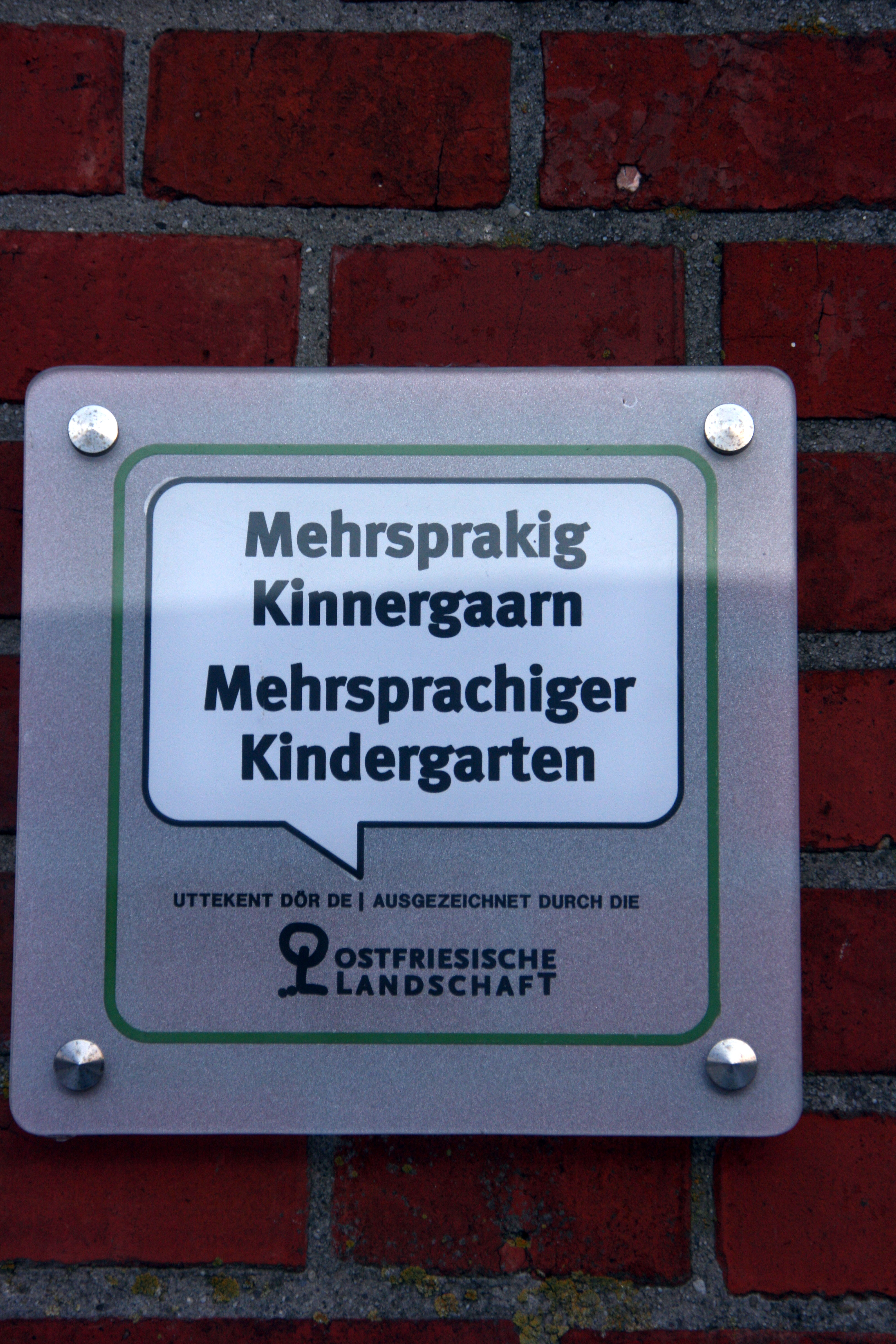 mehrsprachiger Kindergarten in der Krummhörn